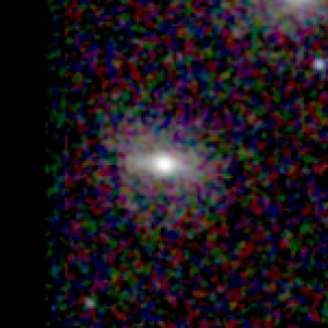 Galaxy NGC 72